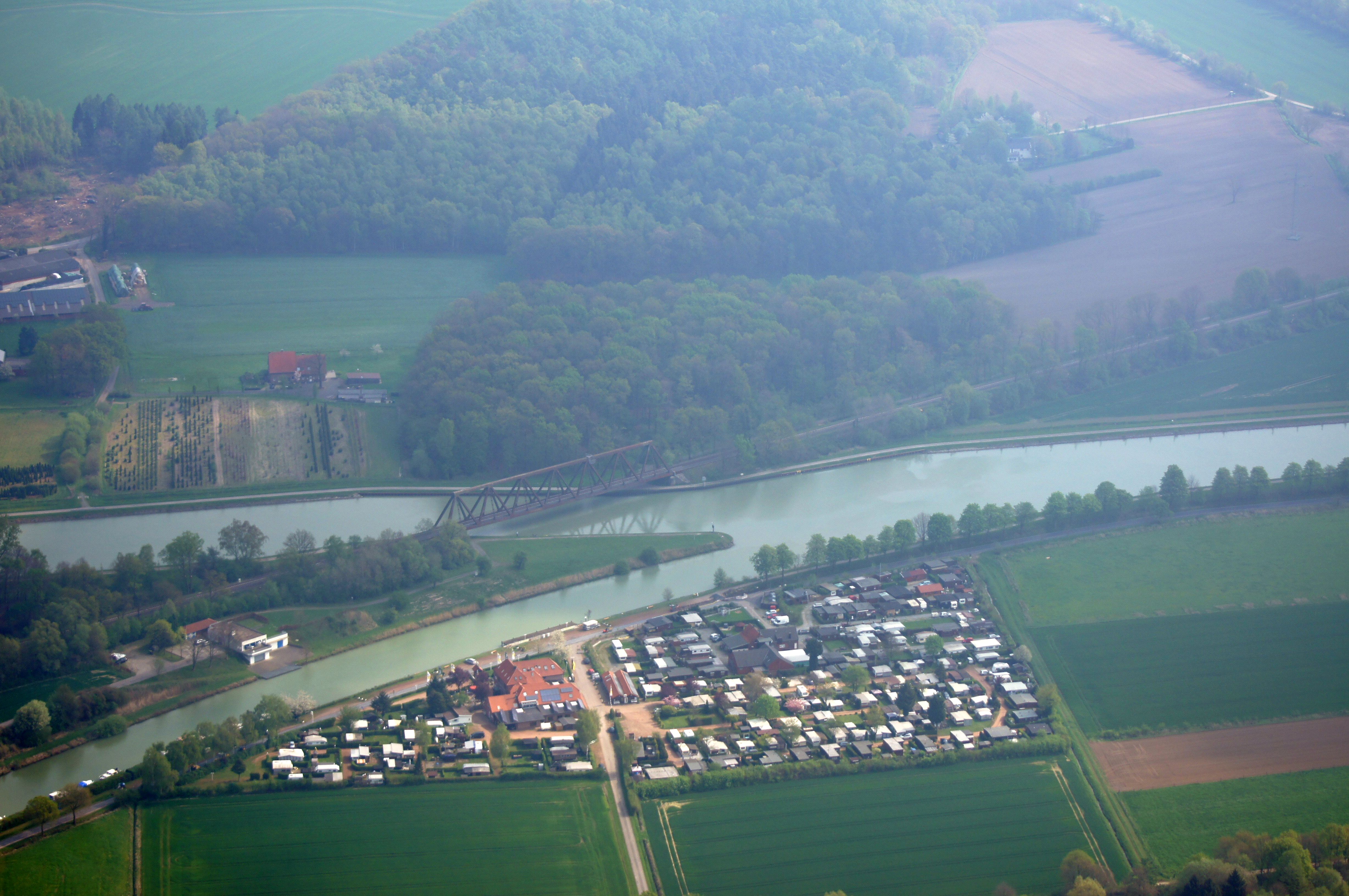 Campingplatz am alten Dortmund-Ems-Kanal; die Aufnahme entstand während des Münsterland-Fotoflugs am 12. April 2014.